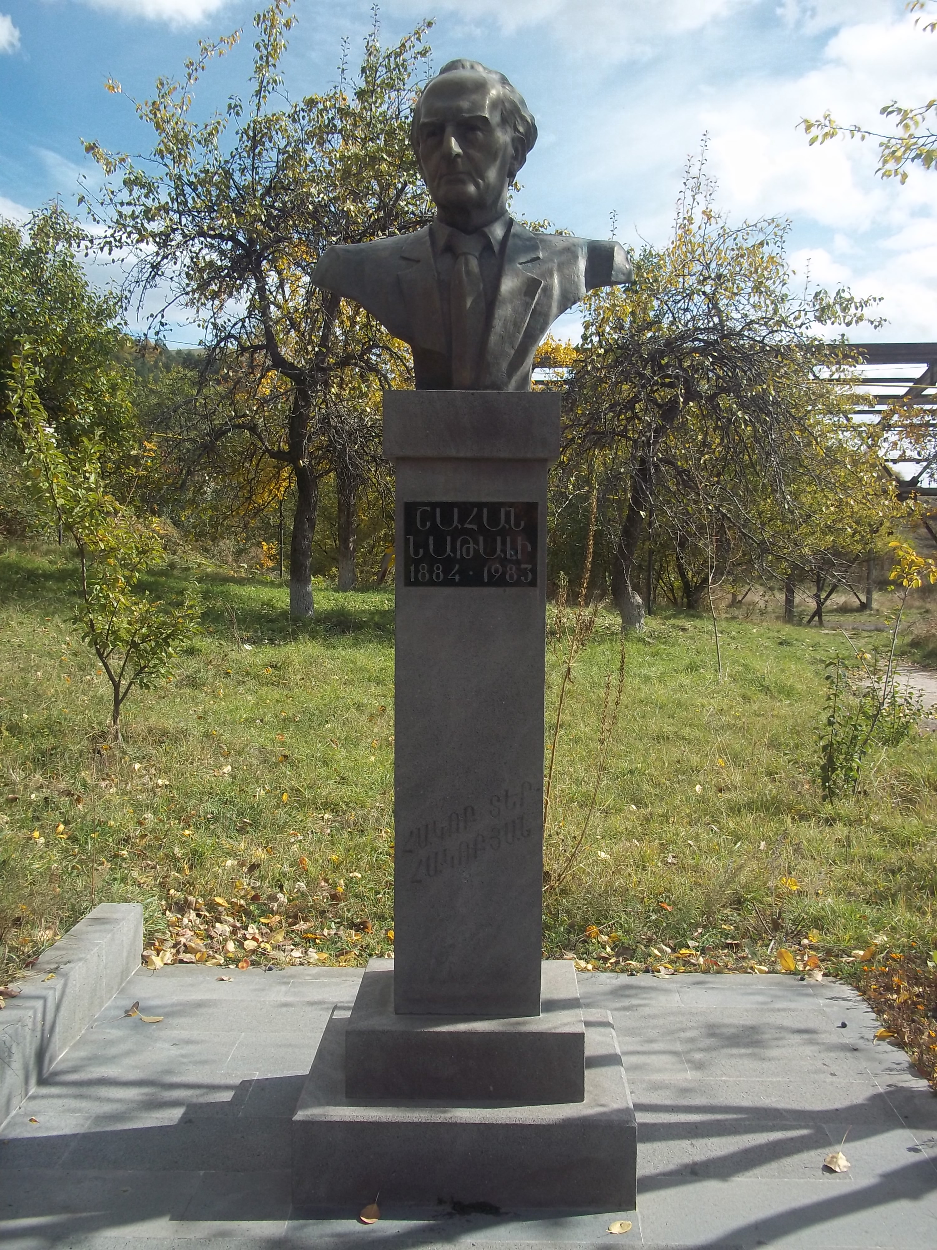 Շահան Նաթալիի կիսանդրին Գորիսի պետական համալսարանի բակում